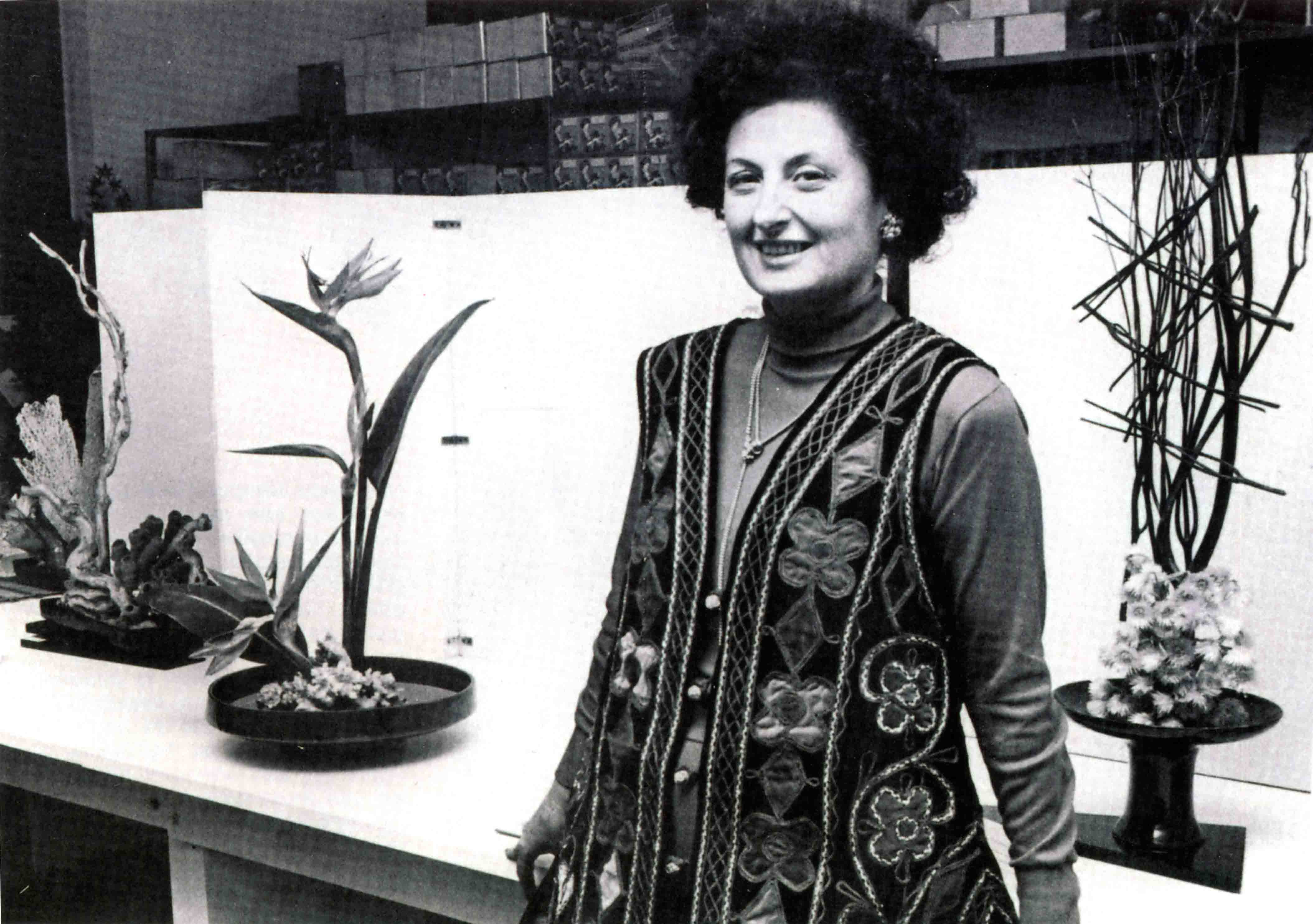 Evi Zamperini Pucci a una mostra personale di composizioni floreali ikebana